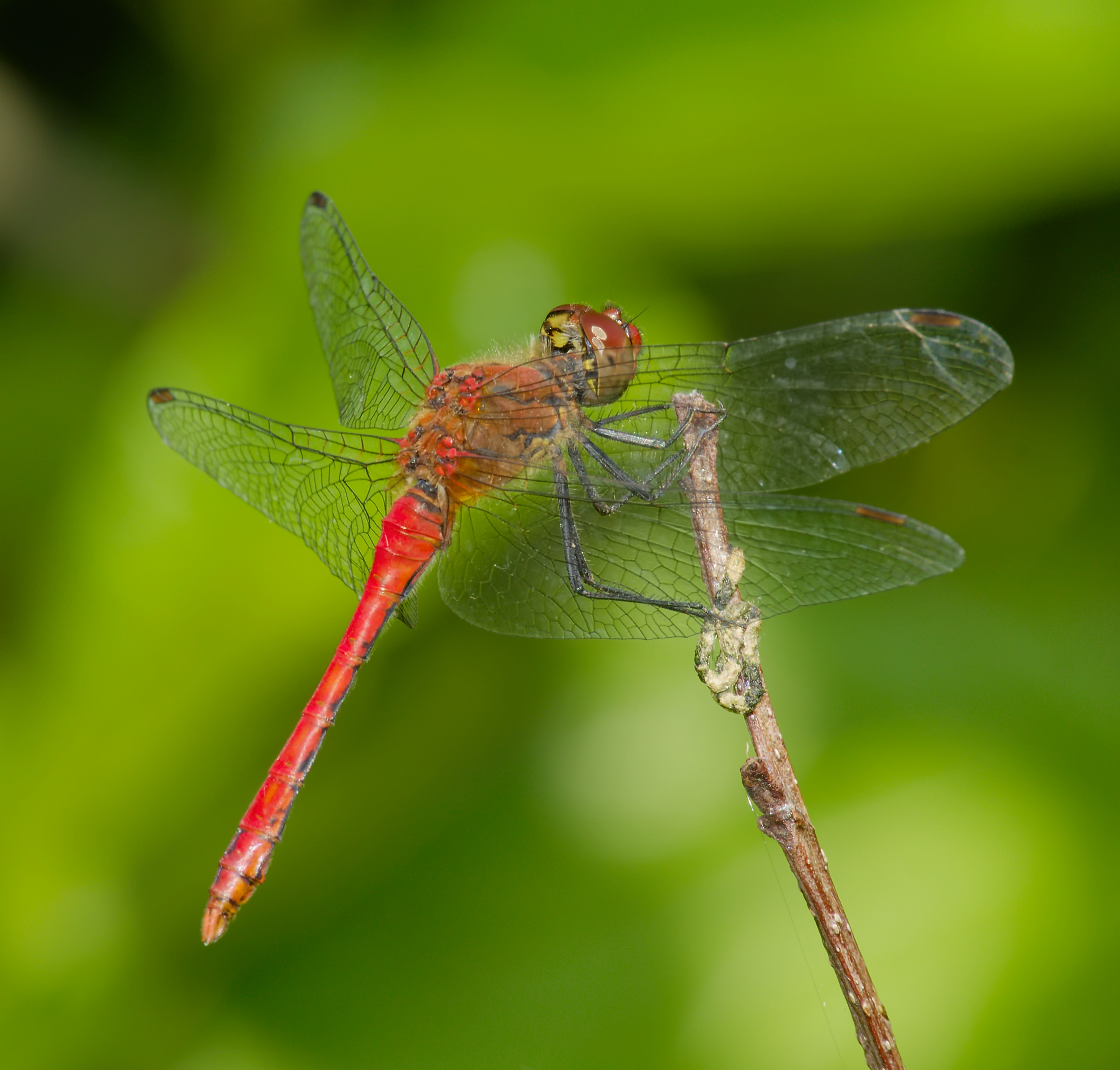 Blutrote Heidelibelle - Sympetrum sanguineum, Männchen. Aufgenommen in Wöllnau Winkelmühle, Doberschütz, Sachsen, Deutschland.